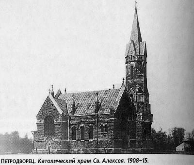 Католический храм Петергоф